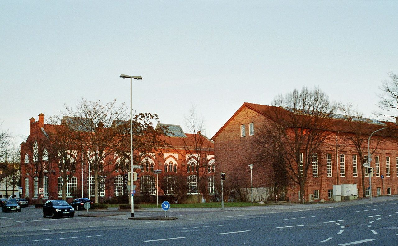 Olga-Jugendzentrum-Heilbronn ehemals Maschinenbau-Gesellschaft Heilbronn